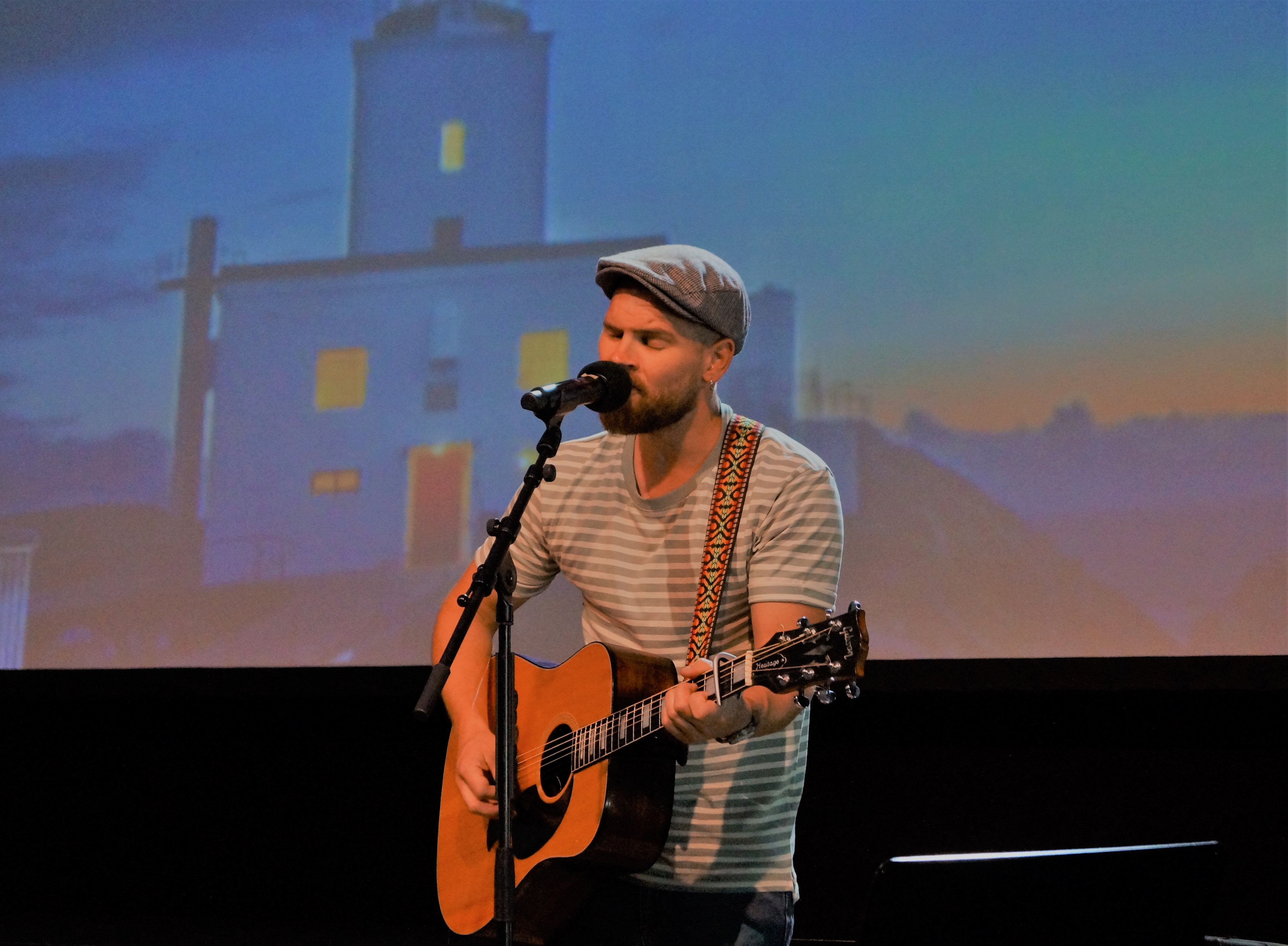 Endre Nordvik spiller på Panorama Hotell & Resort